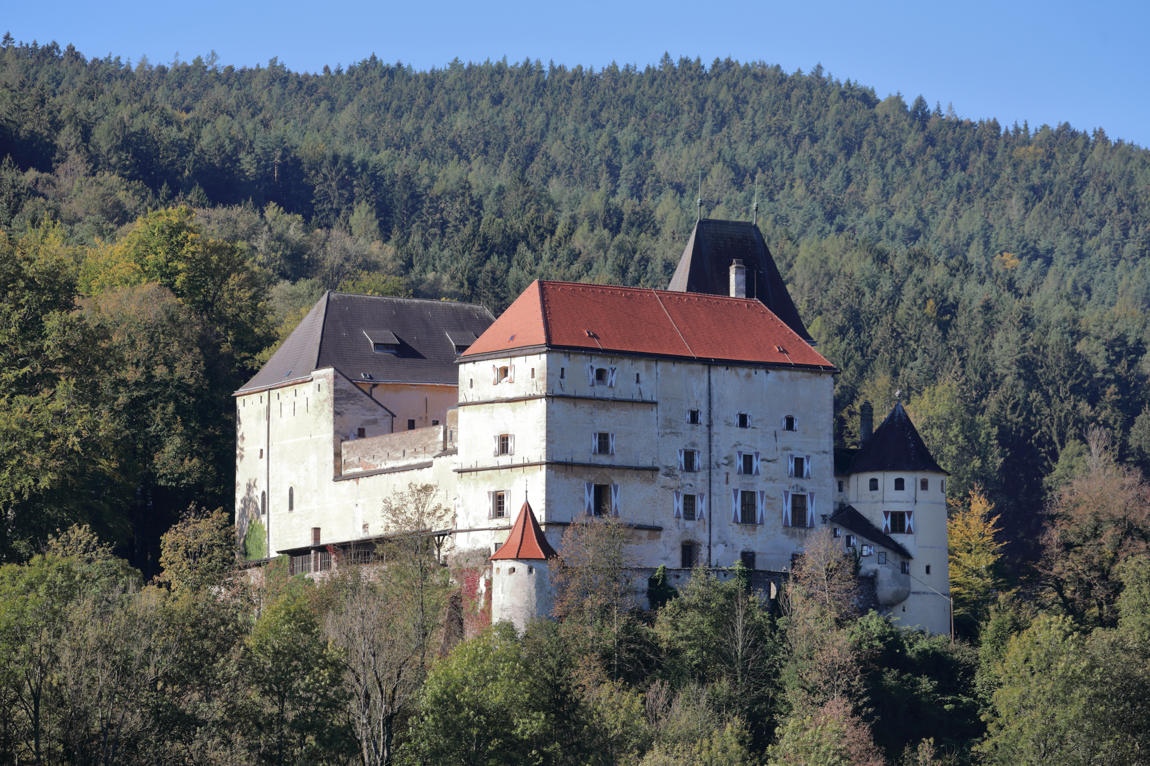 Nordostansicht der Burg in der niederösterreichischen Gemeinde Feistritz am Wechsel.Die Burg, südöstlich über dem Ort gelegen, wurde vermutlich im 12. Jahrhundert errichtet. Um 1500 fand ein spätgotischer Umbau bzw. eine Erweiterung statt. Ein weiterer großzügiger Umbau erfolgte ab 1685. 1815 kam die Anlage in den Besitz Josef Dietrich (1780–1855), Freiherr von Dietrichsberg, der sie im Stil der Romantik erneuerte und ihr im Wesentlichen das heutige Erscheinungsbild gab, wobei der Torturm erst 1922/24 aufgestockt wurde.